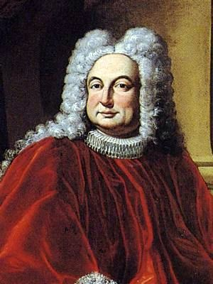 Ritratto del doge Nicolò Cattaneo Della Volta